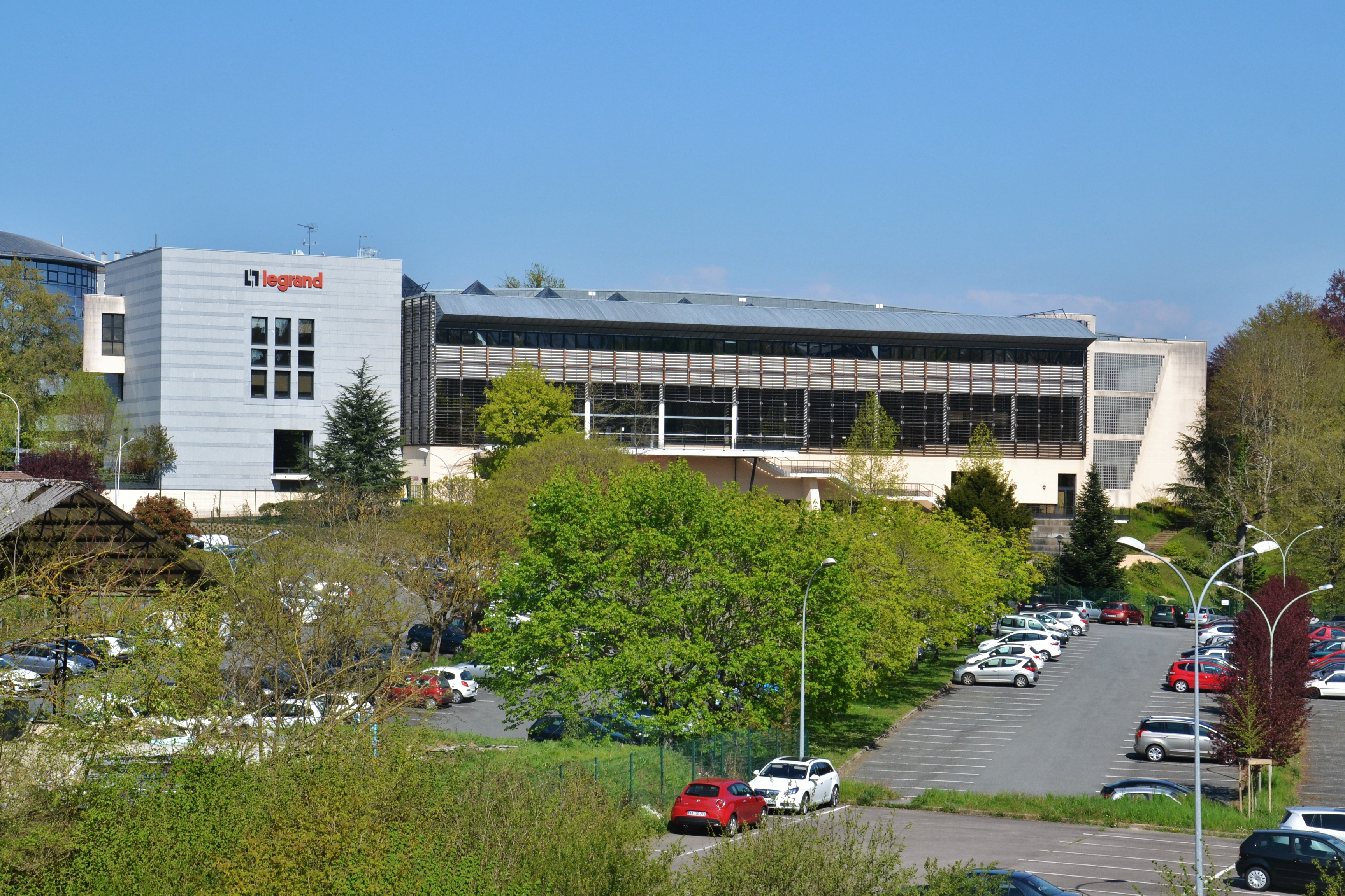 Le siège social de l'entreprise Legrand à Limoges (Haute-Vienne, France)